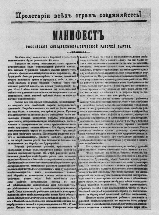 Manifesto clandestino del Partito operaio socialdemocratico russo